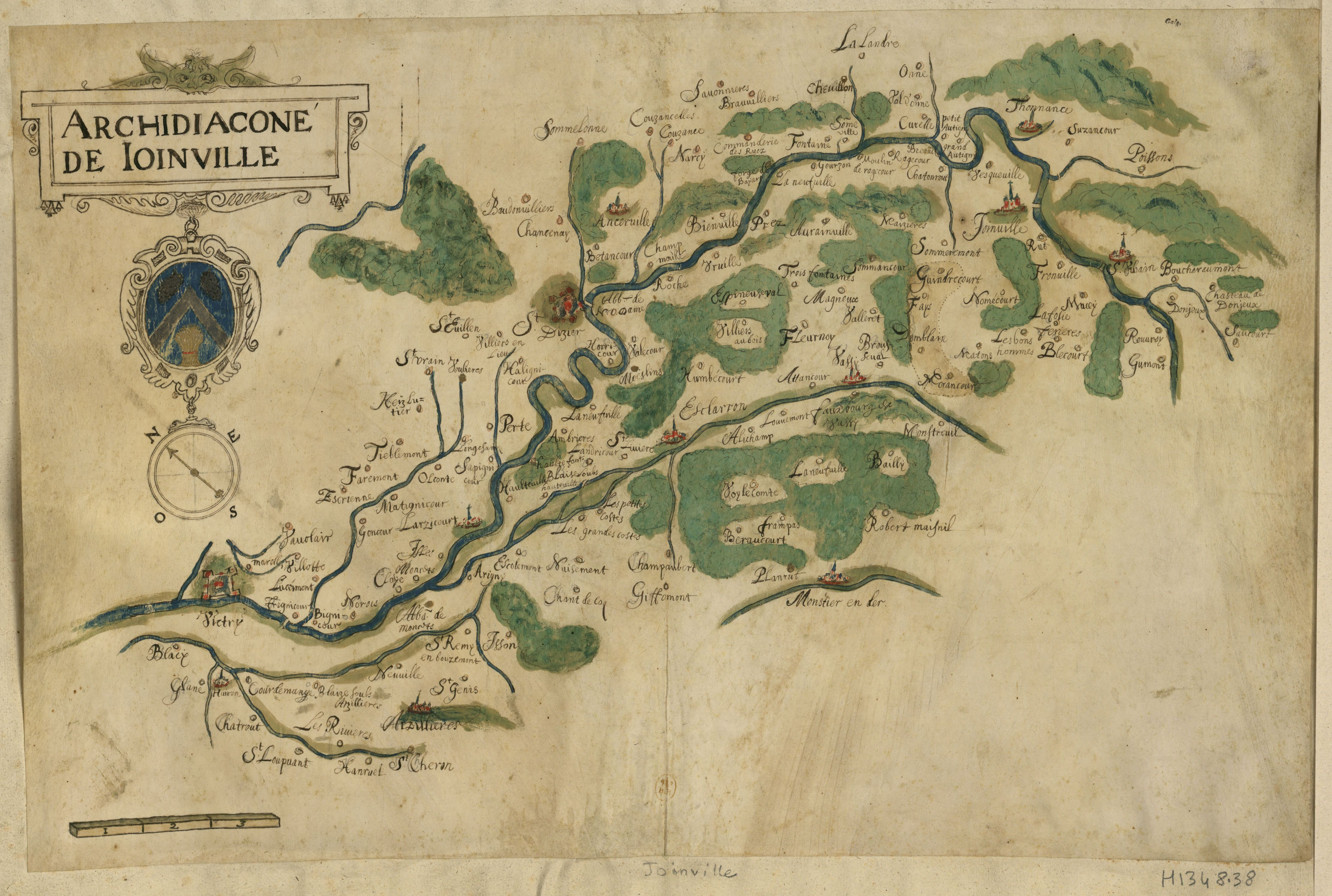 Archidiaconé de Joinville. Carte (aquarelle sur vélin)